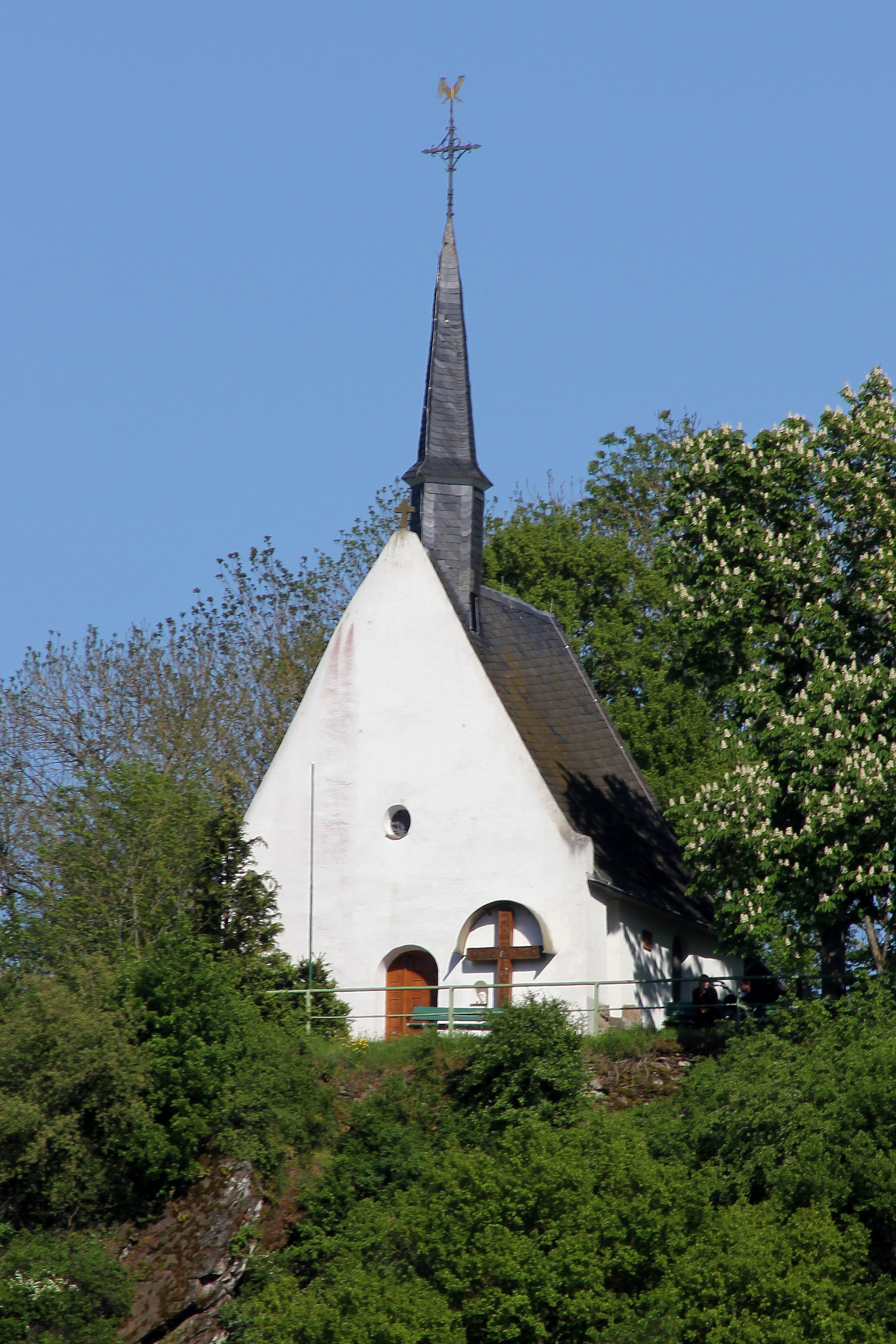 Zilleskapelle Treis-Karden (in der Literatur gelegentlich fälschlicherweise auch Zilskapelle genannt) nördlich von Treis, Westfassade, Blick von Karden